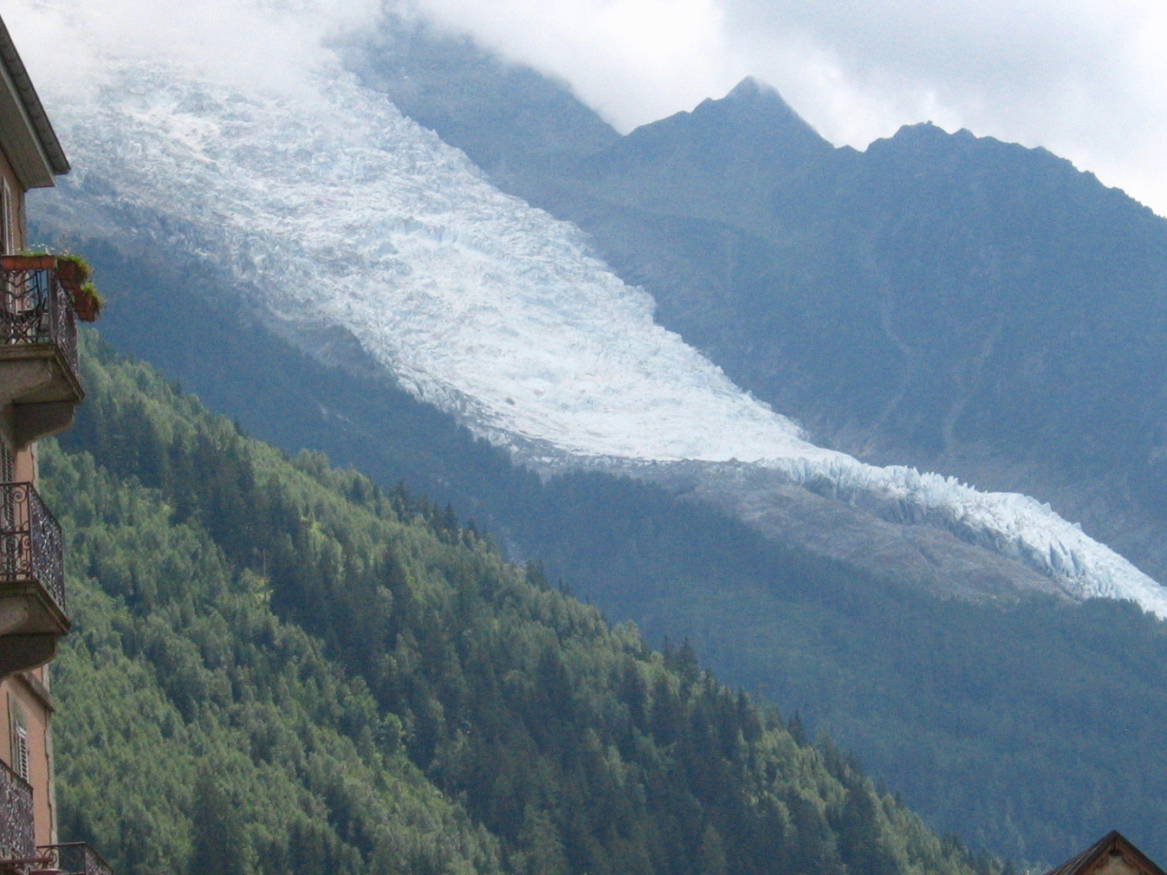 Glacier des Bossons, Chamonix, France